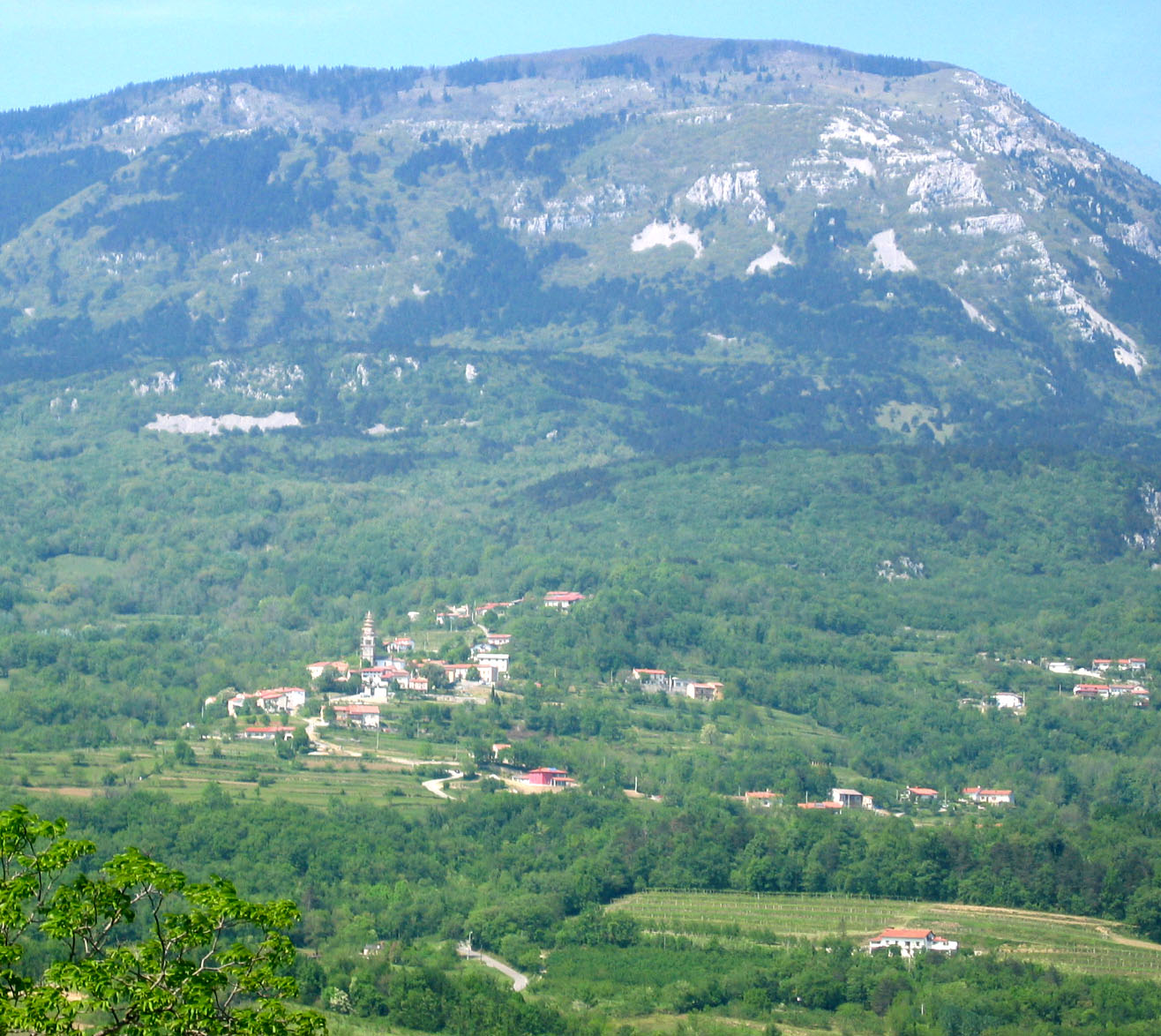 Štomaž, village near Ajdovščina, Slovenia